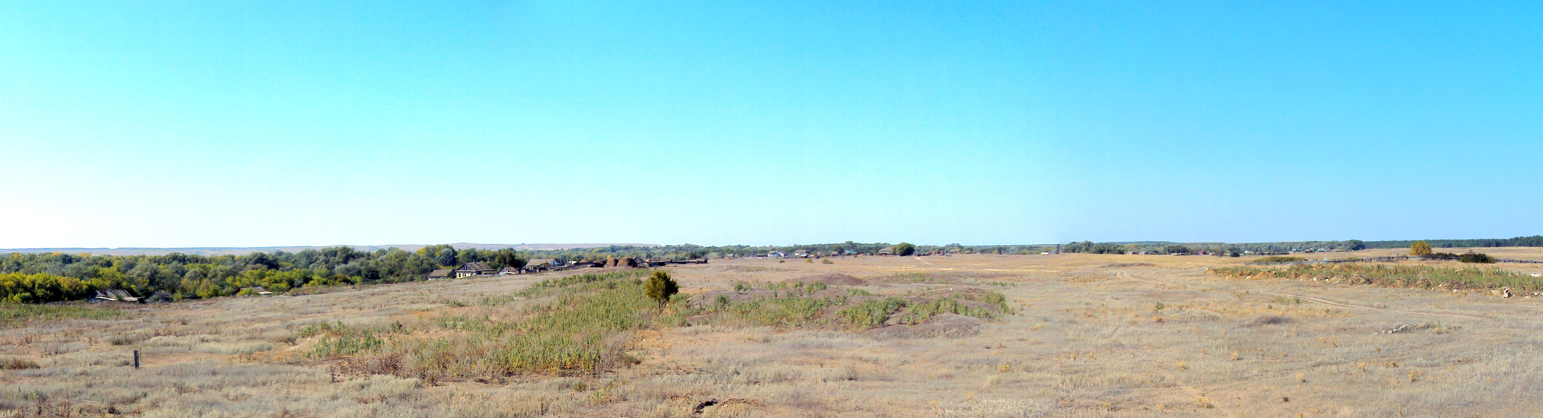 Панорама хутора Ярской 2.